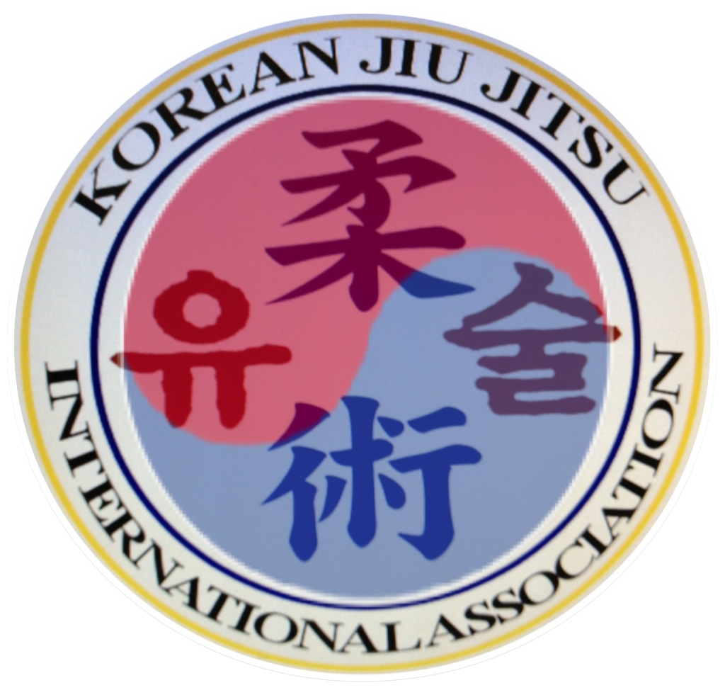 Korean Jiujitsu 1- Es un sistema integral de autodefensa basado en la combinación de las mejores técnicas de distintas artes marciales como taekwondo itf, Hapkido, gongkwon yusul, haidong Gumdo, yeomta sul, brazilian Jiujitsu, estilos que domina el maestro pablo raj, los cuales a aprendido a lo largo de 25 años de estudio por todo el mundo y en la misma cuna de estos como Corea o Brasil. Este estilo se basa en el combate cuerpo a cuerpo en todas sus distancias, con contacto full contact pero con protecciones para su práctica deportiva. También contempla el estudio de armas de golpe como el palo corto tanto en técnicas defensivas como en combate libre. En las armas de corte se estudia el uso del cuchillo para la defensa personal y la espada larga katana. La defensa personal es un apartado importante en el estilo no sólo a nivel de civiles si no también para personal de seguridad privada y pública. La faceta deportiva esta muy presente en este arte marcial y se puede competir en todas sus modalidades .